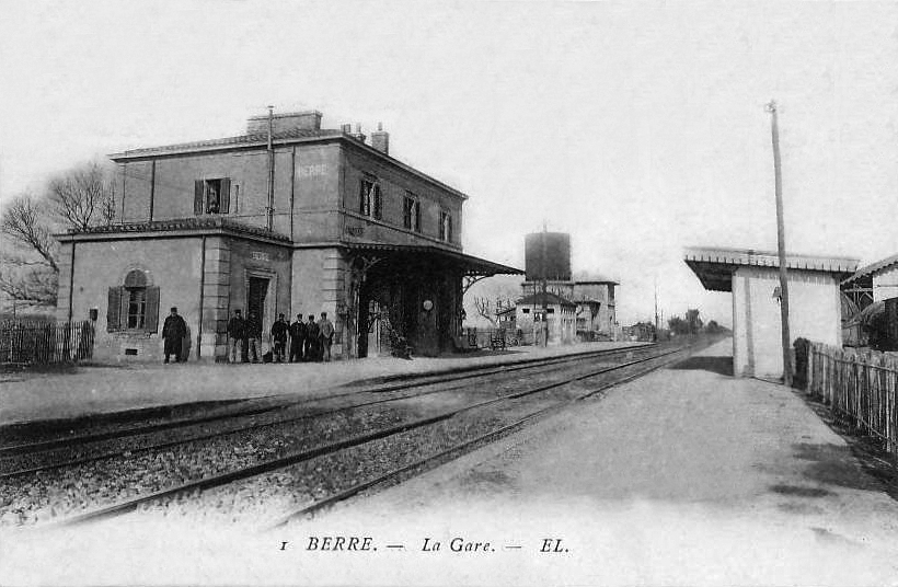 Intérieur de la gare vers 1900.